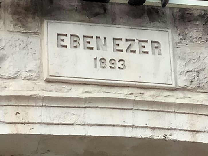 Duck house, haifa